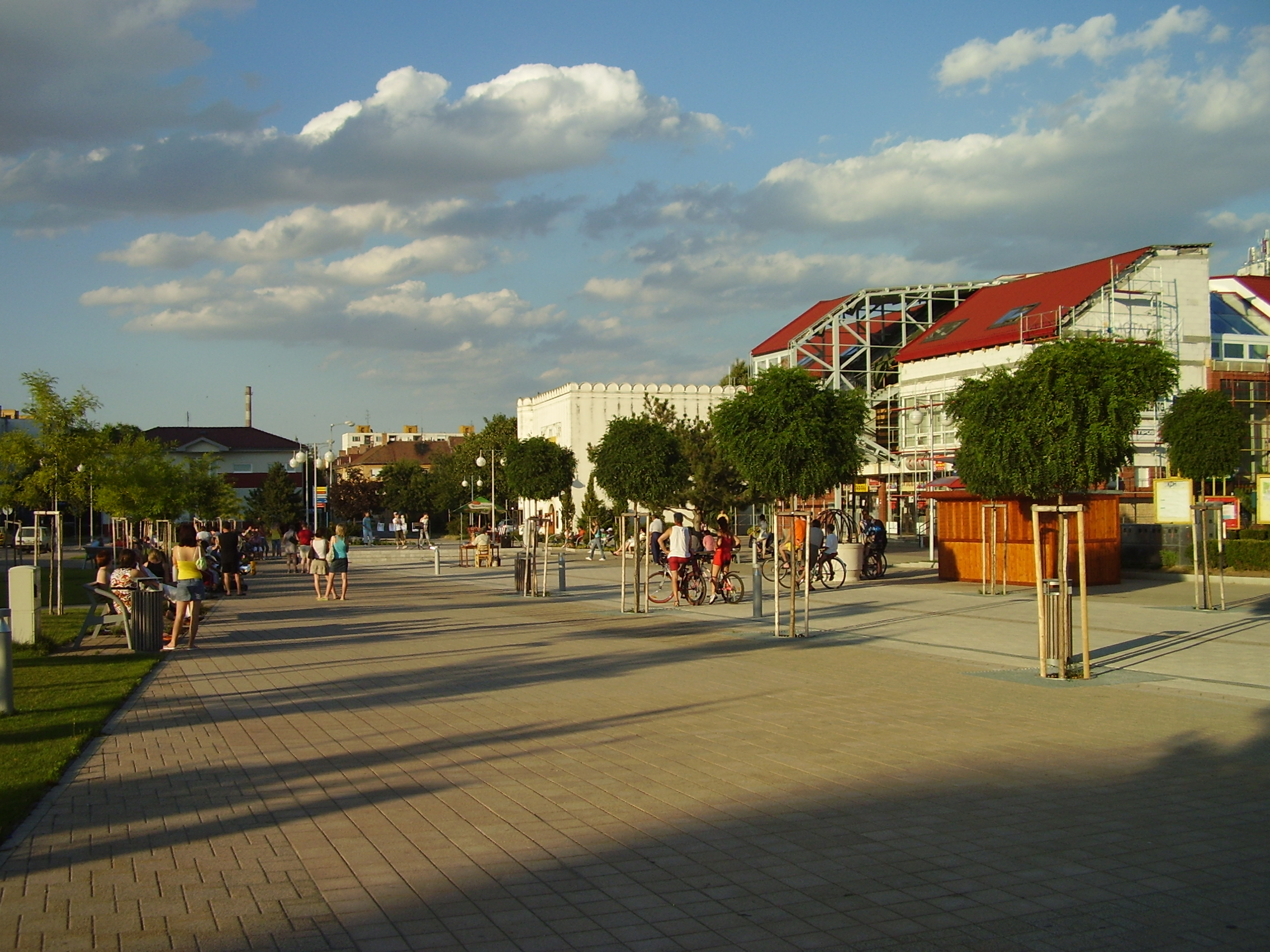 Senec